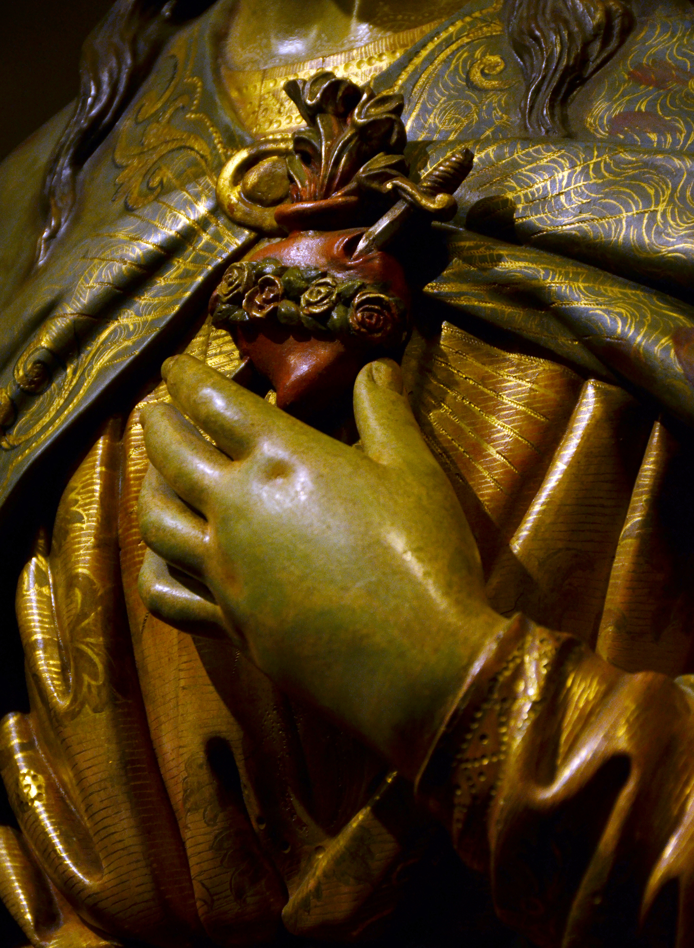 Détail d'une statue dans la cathédrale de barcelone : le Coeur Immaculé de Marie.